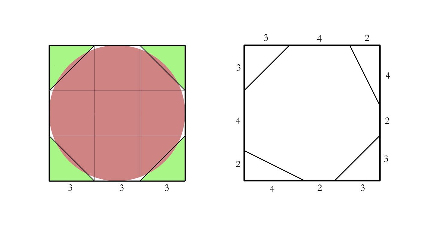 Représentation du problème R48 du papyrus Rhind